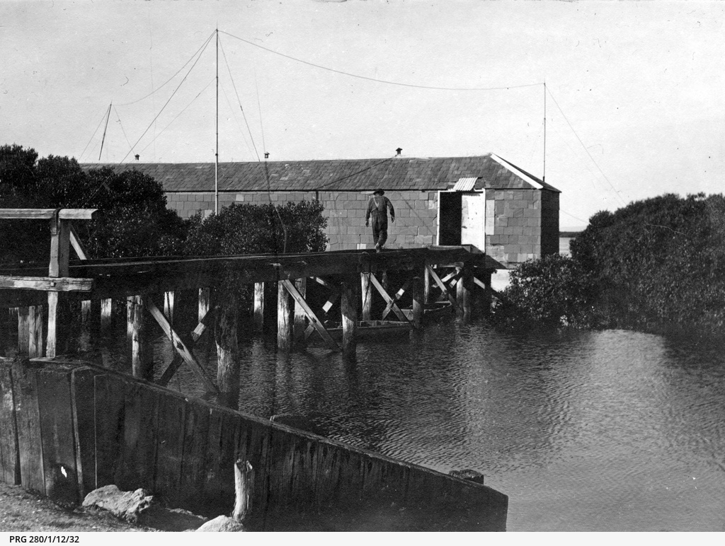 The old explosives depot at the North Arm, Port Adelaide, South Australia. State Library of South Australia, No known copyright restrictions Items on the State Library of South Australia catalogue designated as having 'no known copyright restrictions': have no known cultural sensitivities, and are out of copyright under Australian copyright law, or in copyright, but copyright is owned by the State Library of South Australia with unreserved use by State Library customers , or in copyright, but the copyright owner has freed them for unreserved use by State Library customers. Conditions of use Permission to use such items for any purpose, including publishing, is not required from the State Library however, the following conditions must be adhered to: Acknowledgement of the State Library is required to use this material for any purpose. Acknowledgement should include the phrase State Library of South Australia - followed by the Library's unique identifying number such as B 3456, PRG 1218/3 or OH 456/1. More information about citing material from the State Library's collection can be found on the page 'Acknowledging your State Library of South Australia sources'. If the catalogue record indicates additional conditions of use, such as those imposed by donors, then these must also be met. The State Library does not endorse or support derogatory use of any item from its collection. Re-publishing of an item does not create a new copyright in this item.